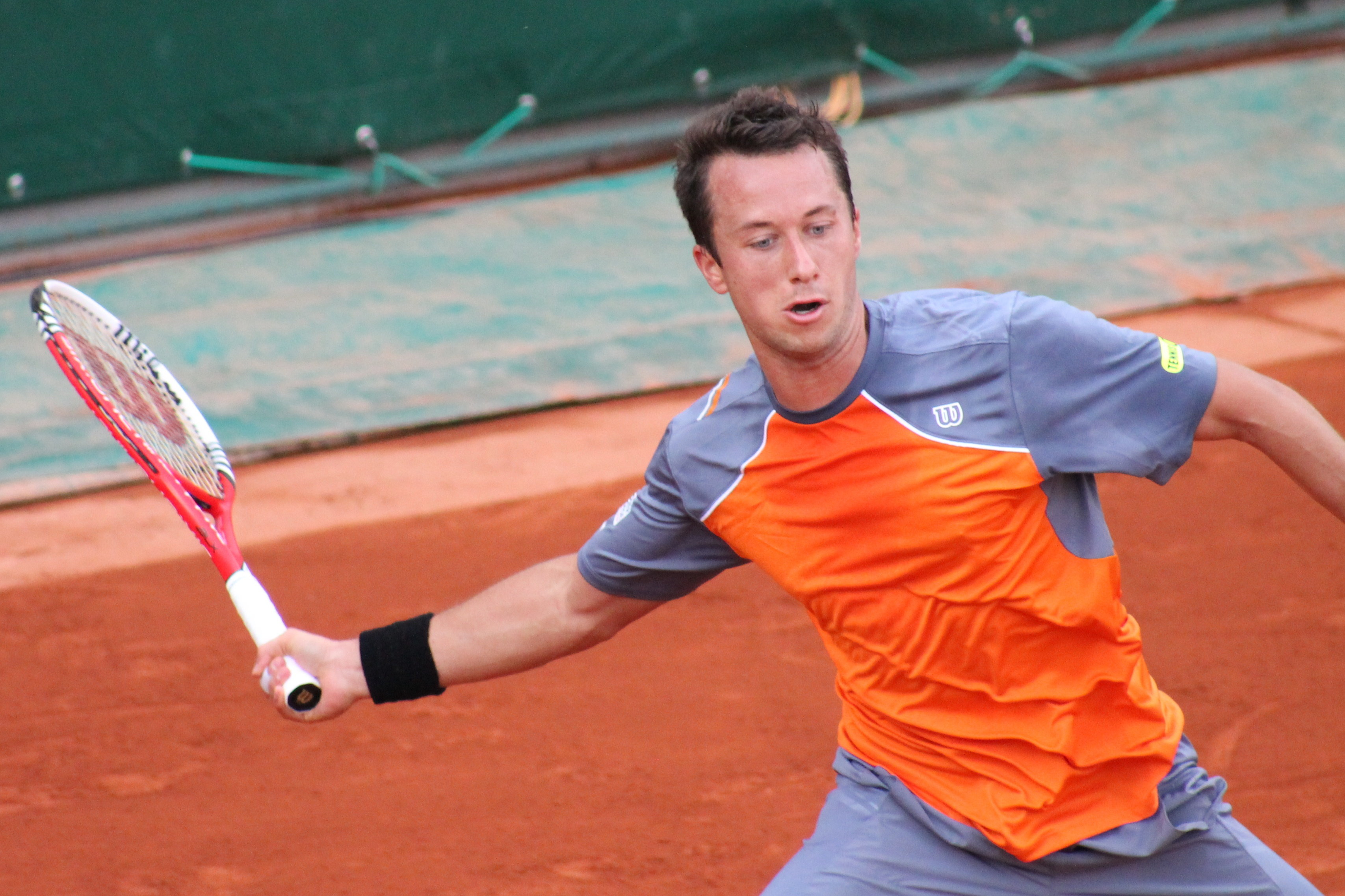 Kohlschreiber RG13 (18)